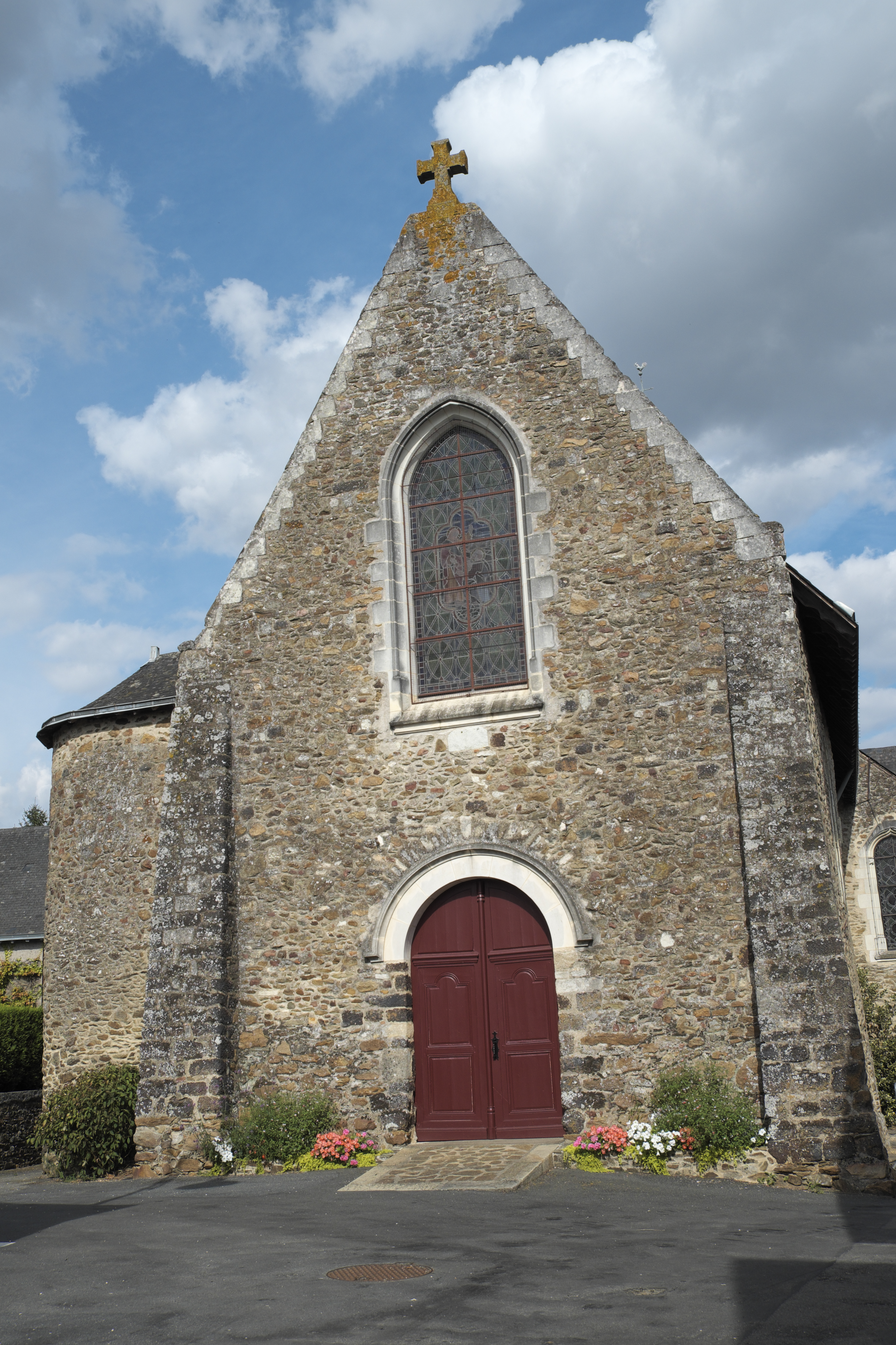 Kirche Sainte-Opportune in Gennes-sur-Glaize im Département Mayenne (Pays de la Loire/Frankreich)